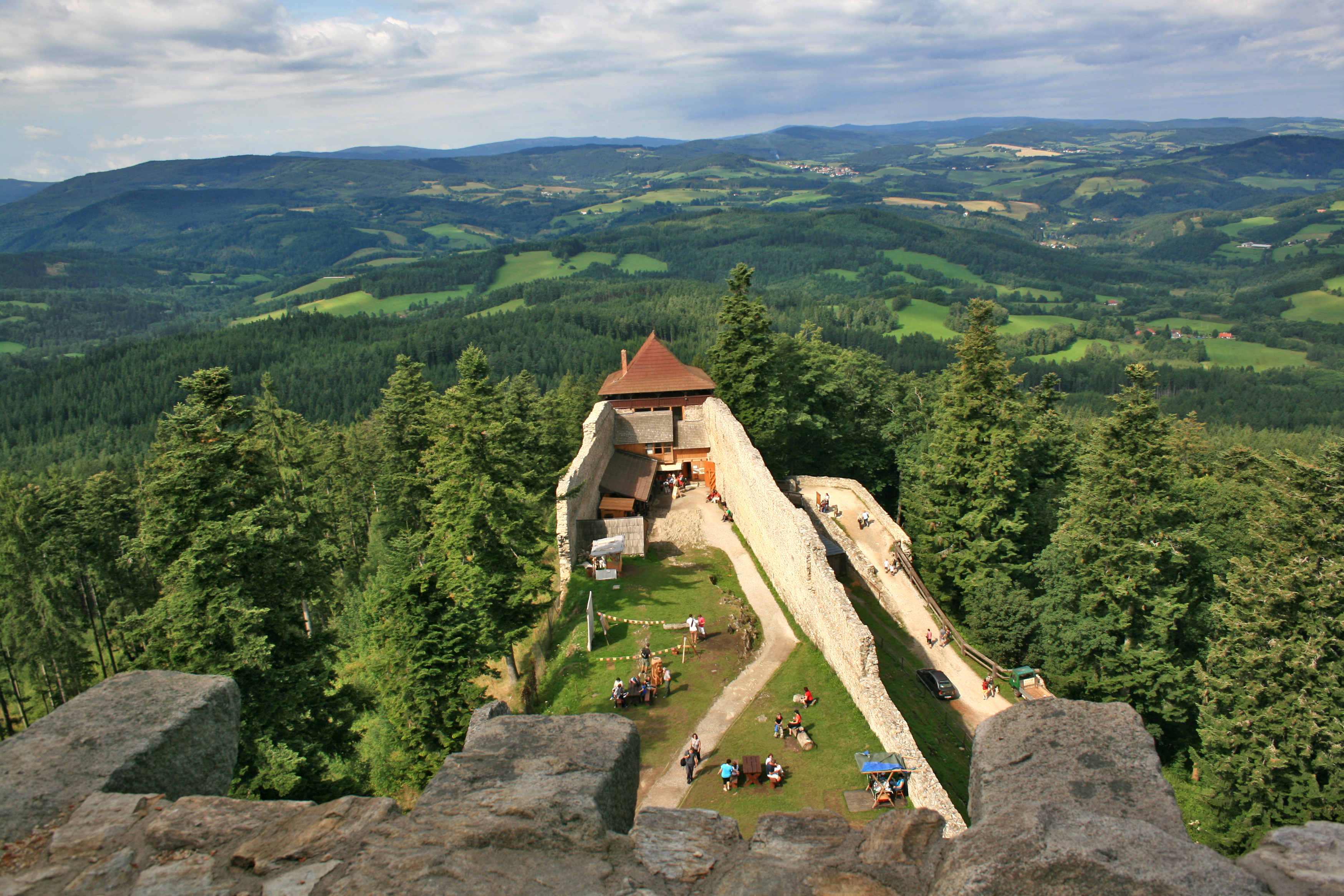 Hrad Kašperk, Žlíbek